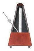 Metronomoa